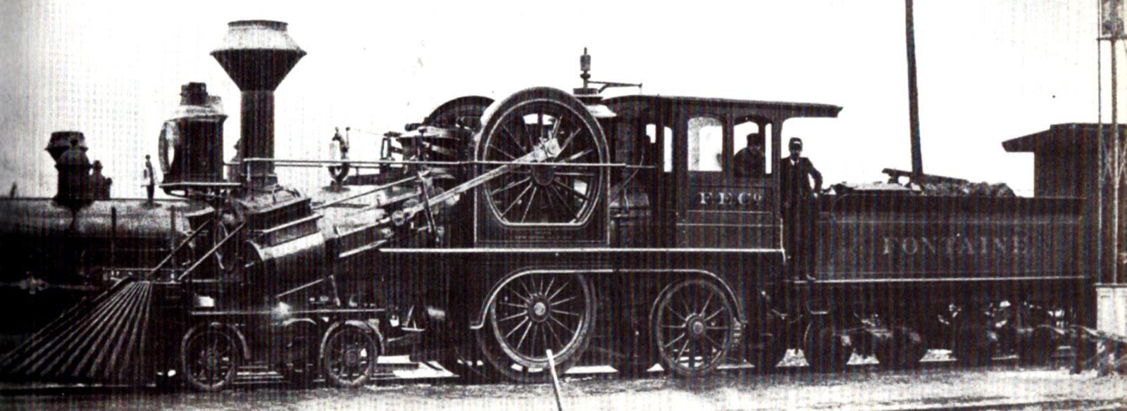 Первый паровоз с фрикционной передачей.